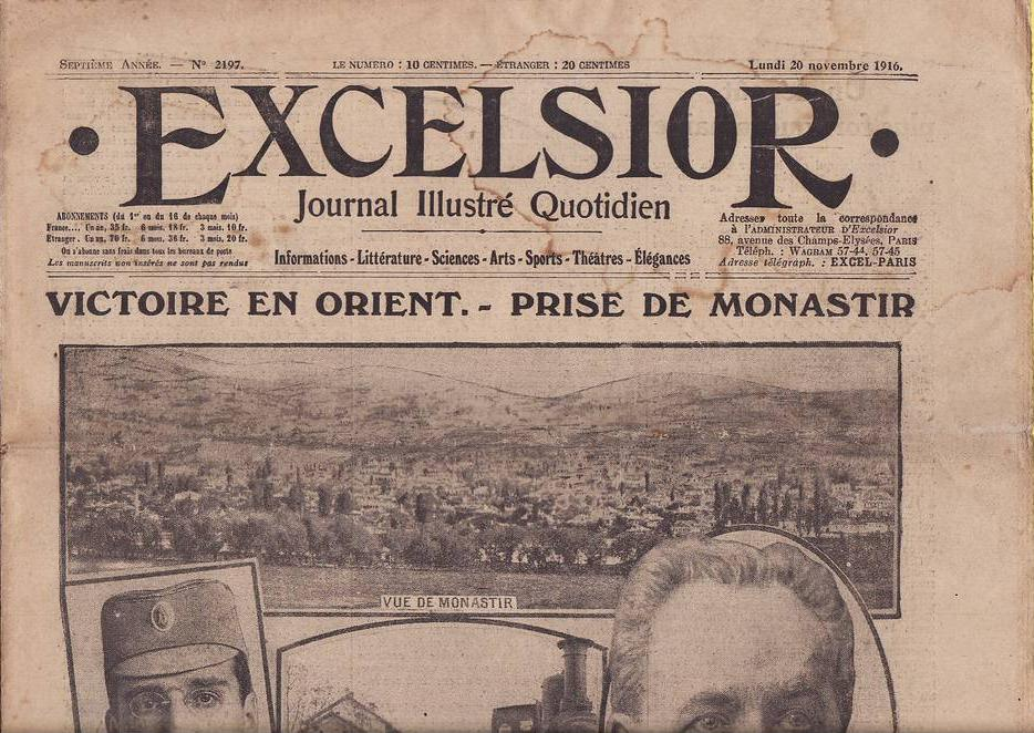 Брой на вестник "Екселсиор", посветен на падането на Битоля